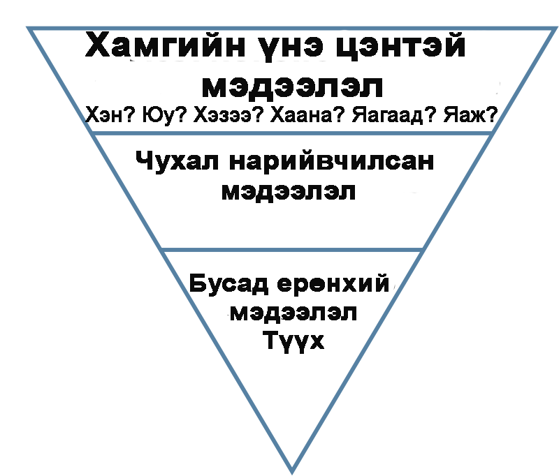 Монгол: Уруугаа харсан гурвалжин бүтэц /сэтгүүл зүй/